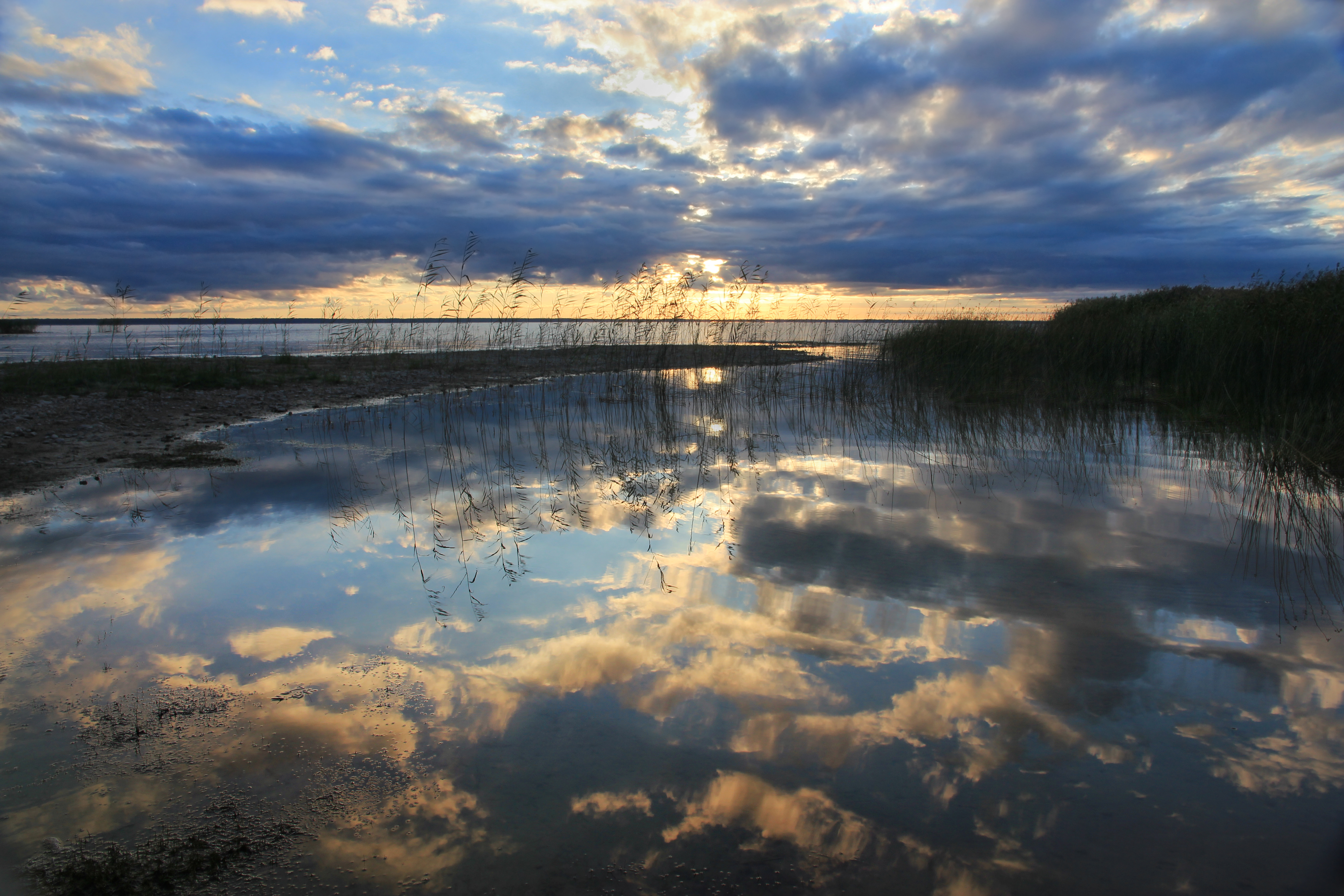 Võrtsjärv